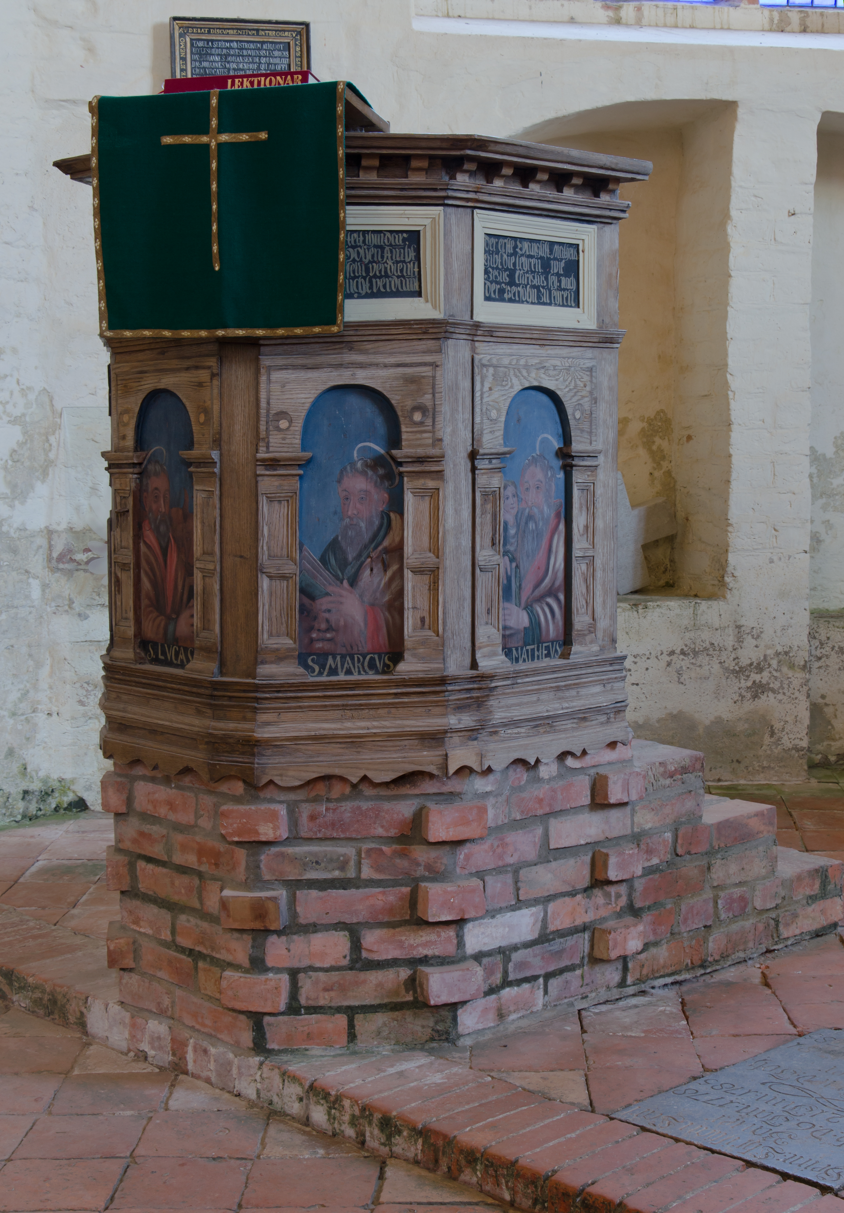 Kirche in Retschow - Kanzel; Unter dem Buch von Apostel Marcus ist ein Gesicht erkennbar. Über die Hintergründe konnte ich bisher nichts in Erfahrung bringen.